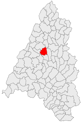 Categorie:Hărţi ale judeţului Bihor